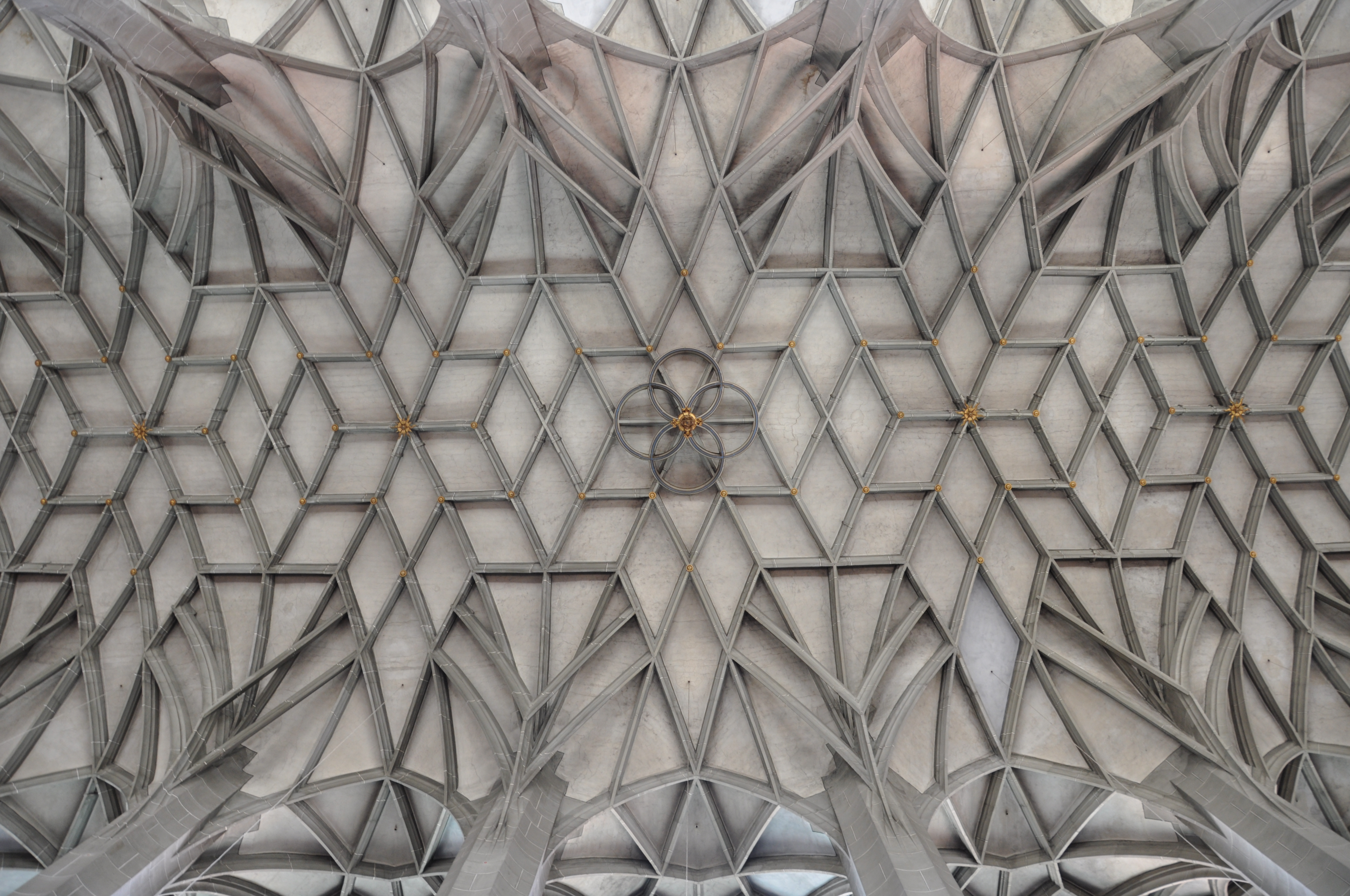 Halle (Saale), Marktkirche Gewölbe